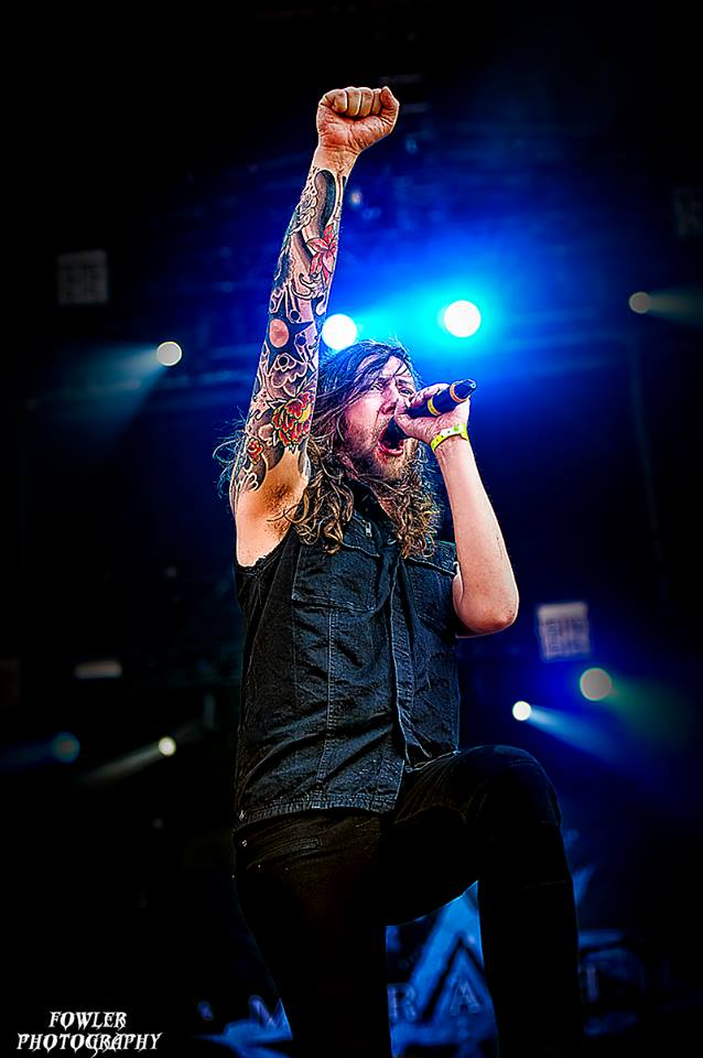 Andy Solveström in Finland with Amaranthe 2013